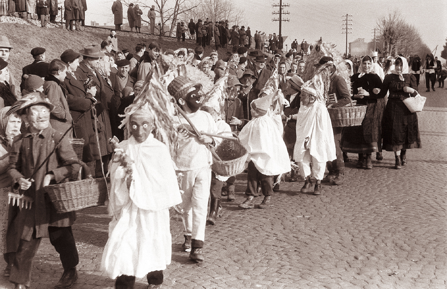 Ptujski pustni karneval in kurentovanje